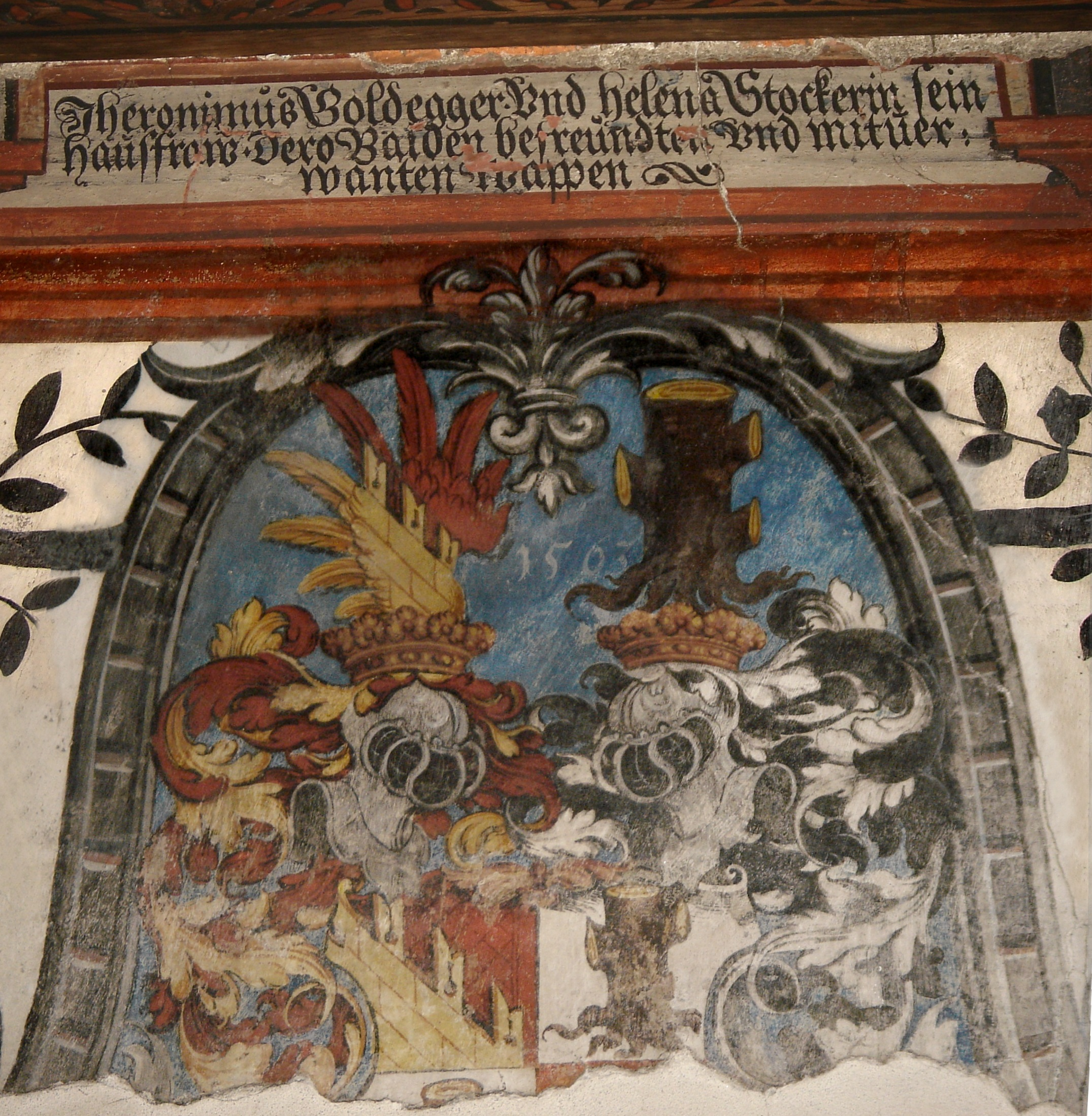 Allianzwappen Goldegg-Stocker. Lana, Südtirol, Italien.